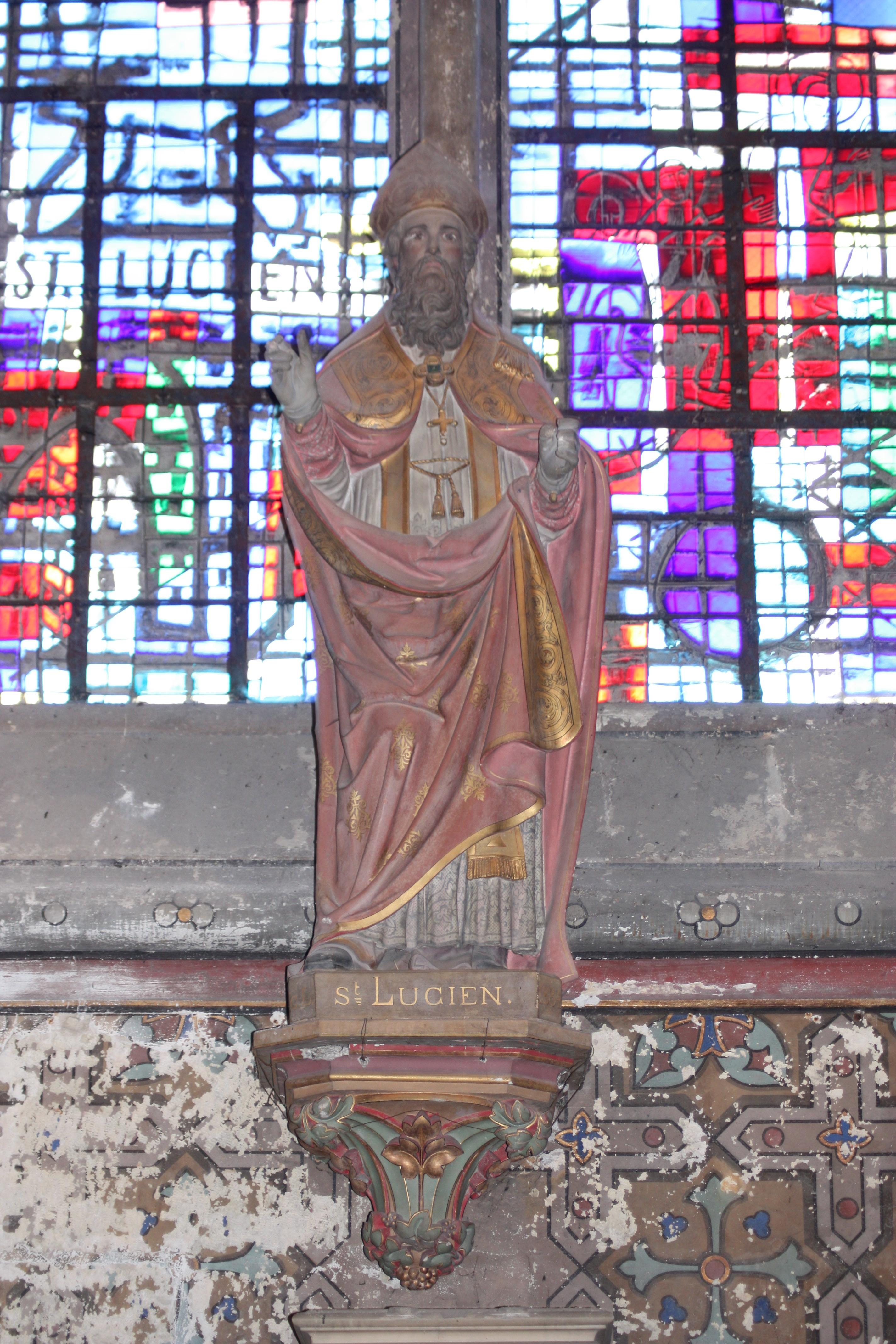 statue de saint lucien